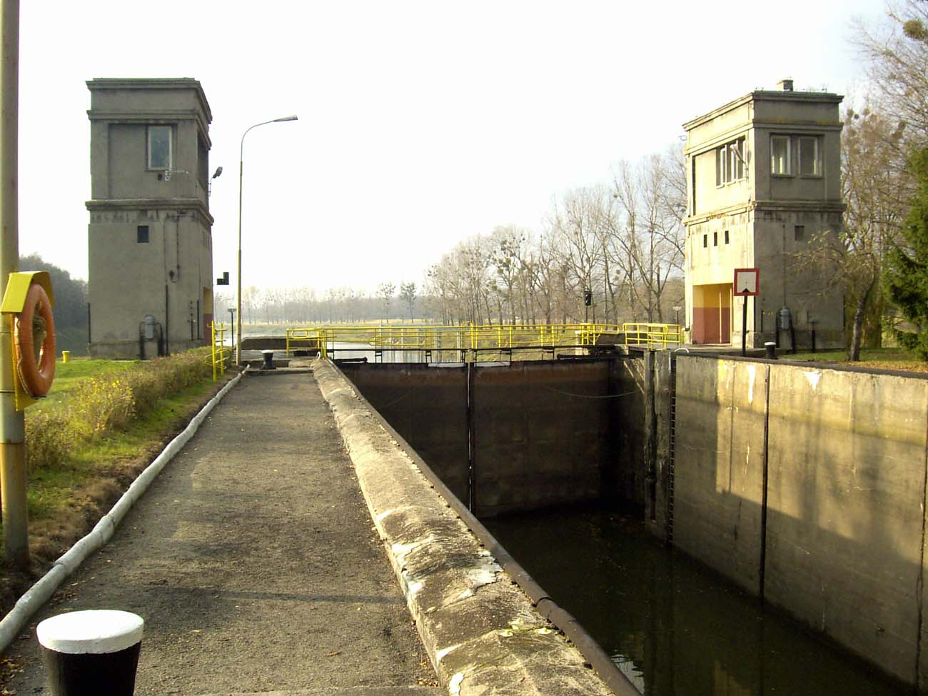 Stopień wodny Brzeg Dolny-Widok głowy dolnej śluzy Brzeg Dolny.